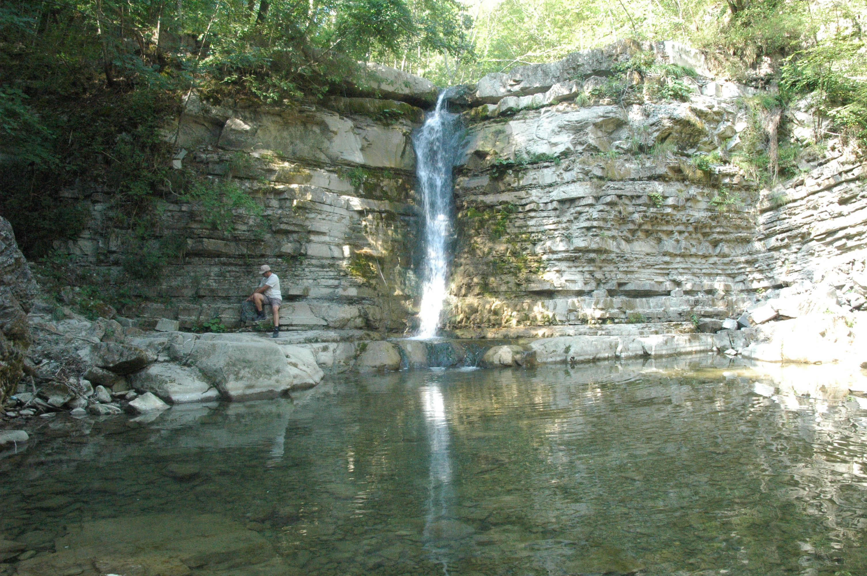 Cascate del Perino, Calenzano (Piacenza)